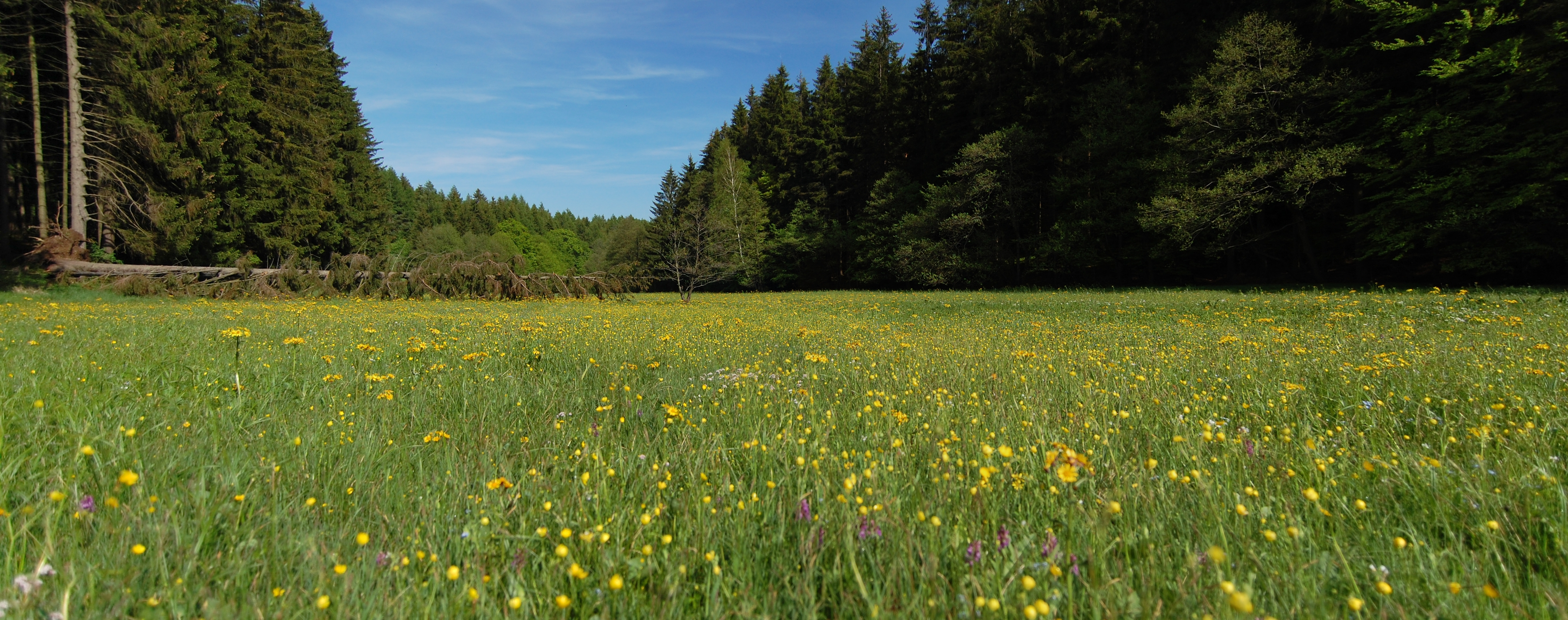 Přírodní rezervace Lipovské úpolínové louky - spadlý smrk, Lipová, okres Prostějov